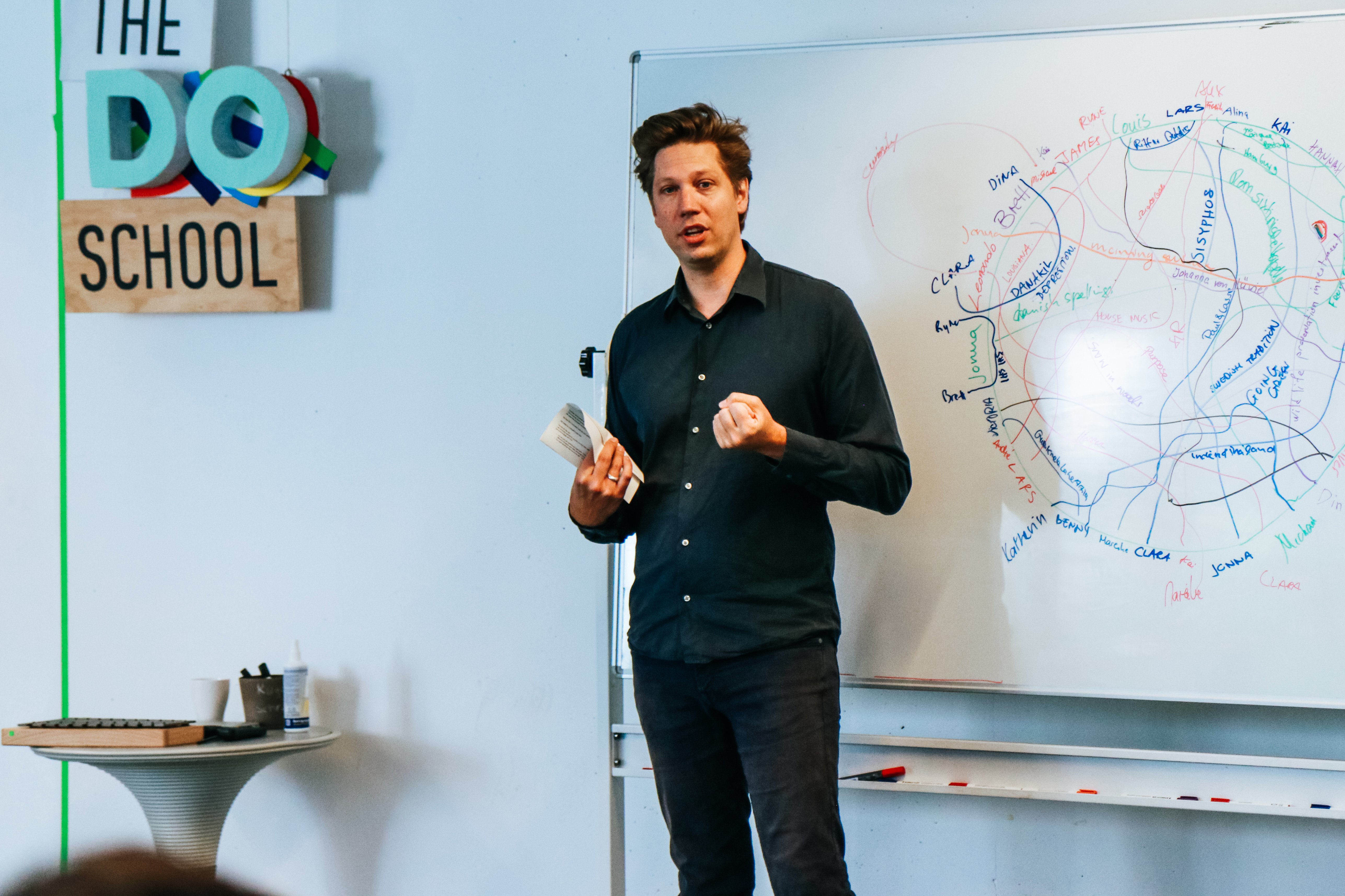 Florian Hoffmann während einer Keynote zu nachhaltigem Handel, Juni 2019.